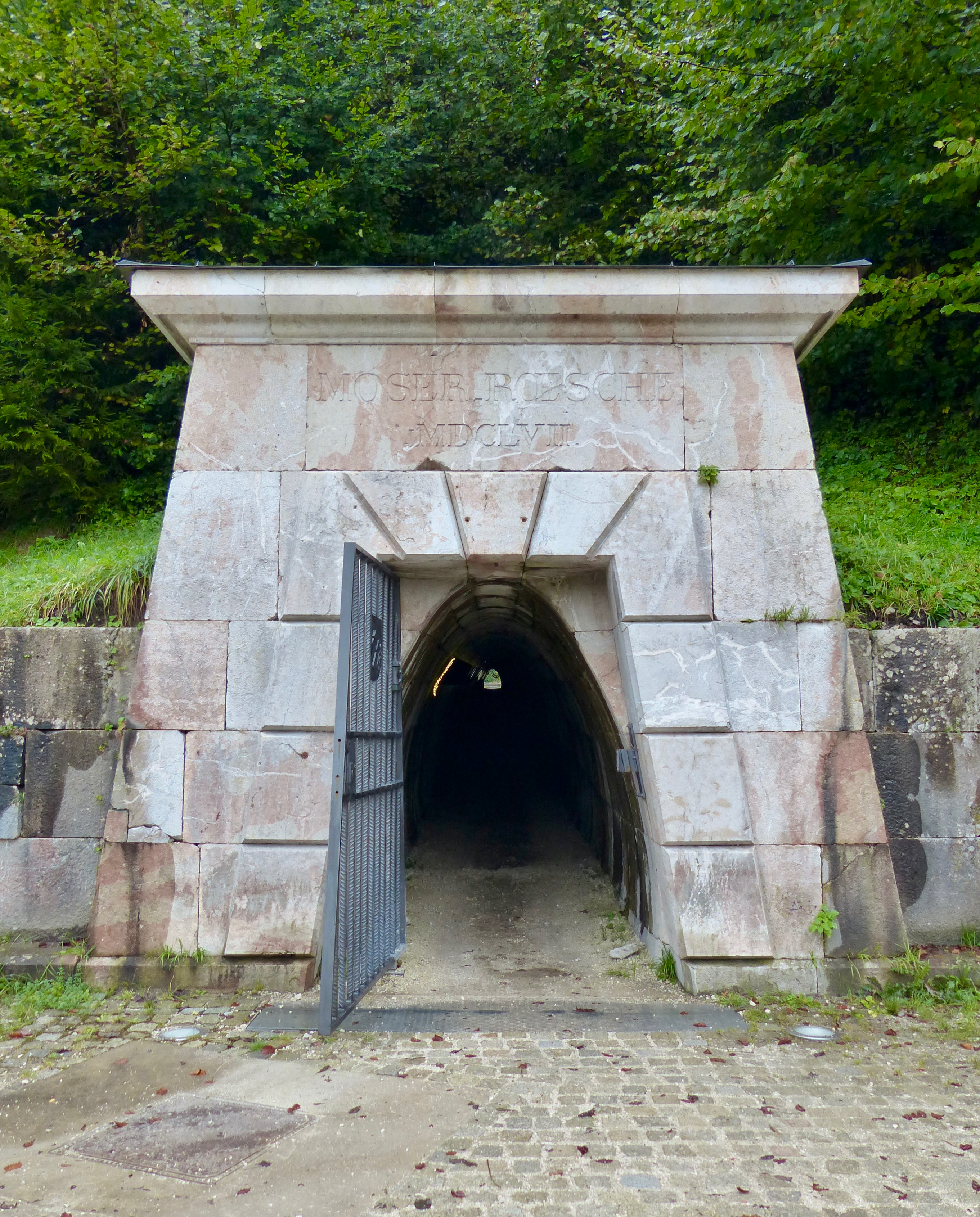 Geotop Moserrösche oberhalb des Salzbergwerkes Berchtesgaden: westliches Stollenmundloch